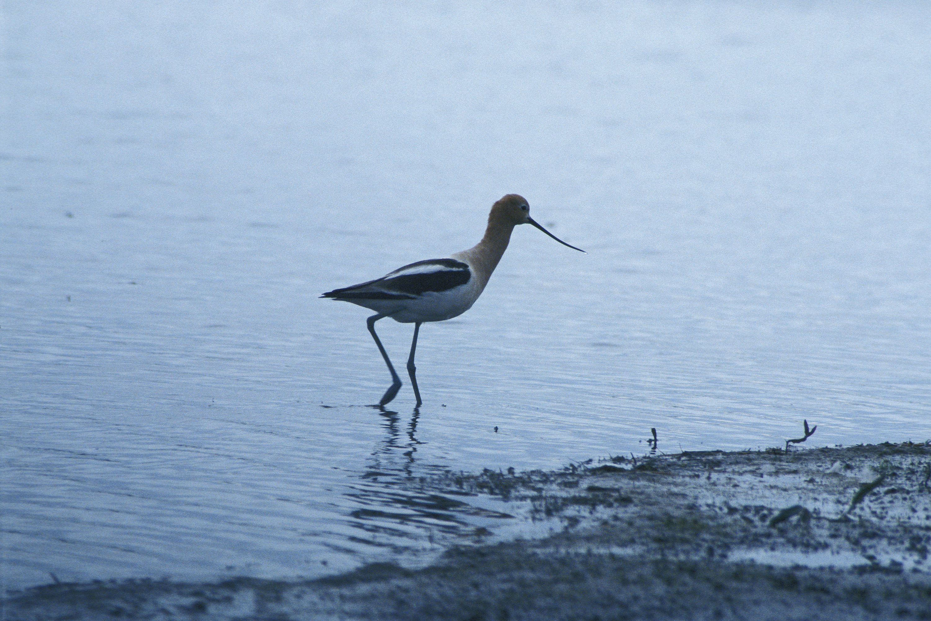 American Avocet, Recurvirostra americana